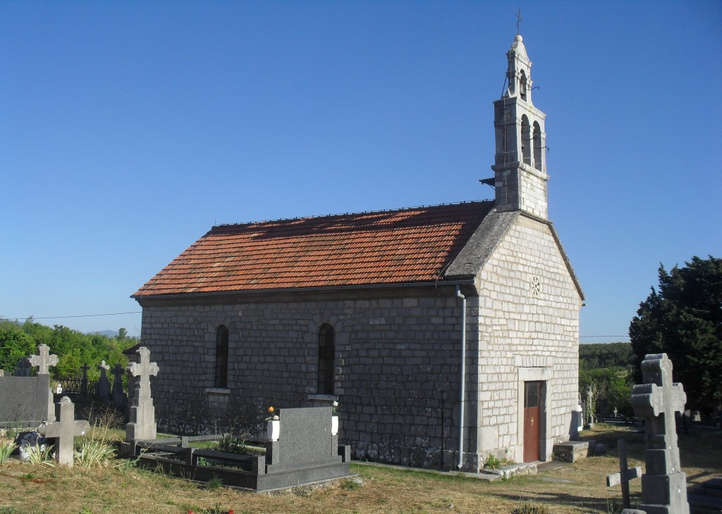 Храм СПЦ Светог великомученика Георгија, Пађене, Далмација